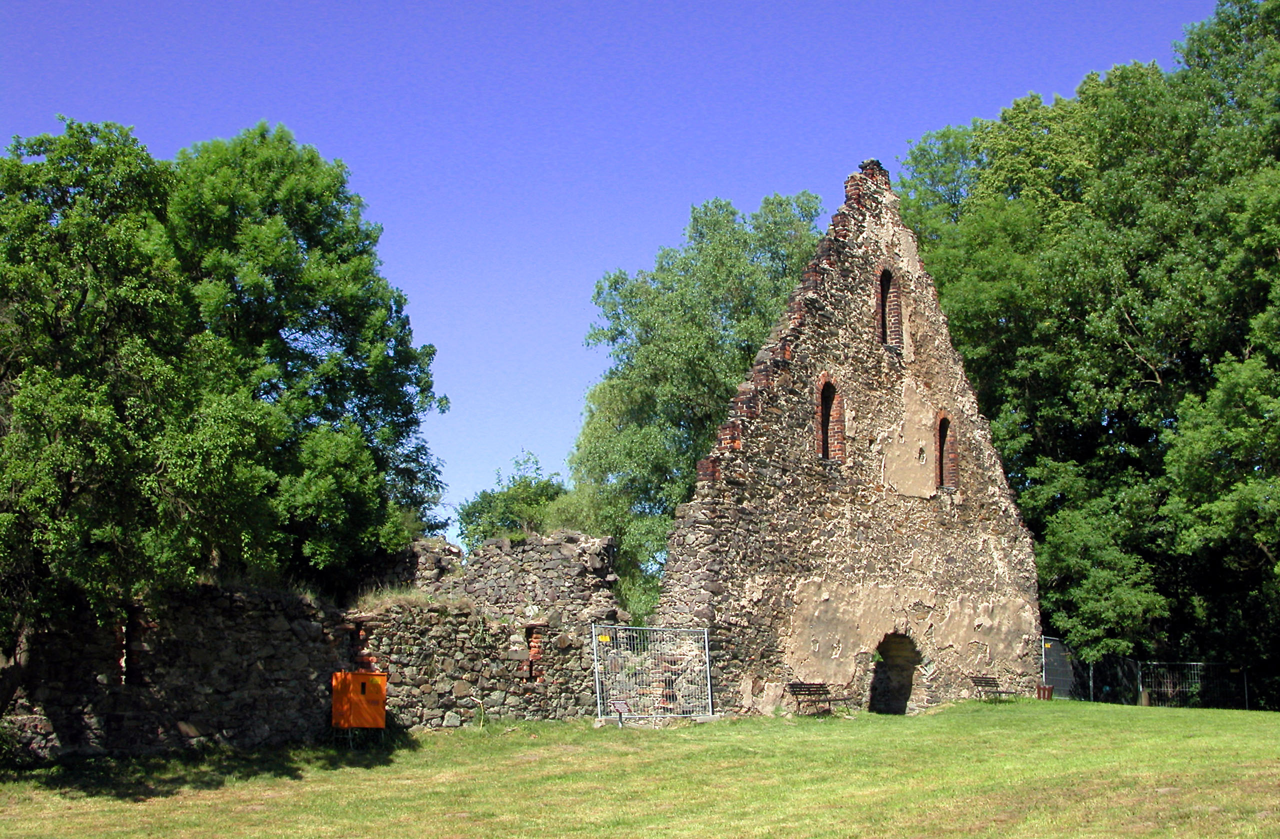 30.05.2003 01683 Altzella (Nossen): Kloster Altzella. Ruine des Schüttgebäudes (GMP: 51.061674,13.276308) [DSCNx.JPG]20030530490JPG(c)Blobelt